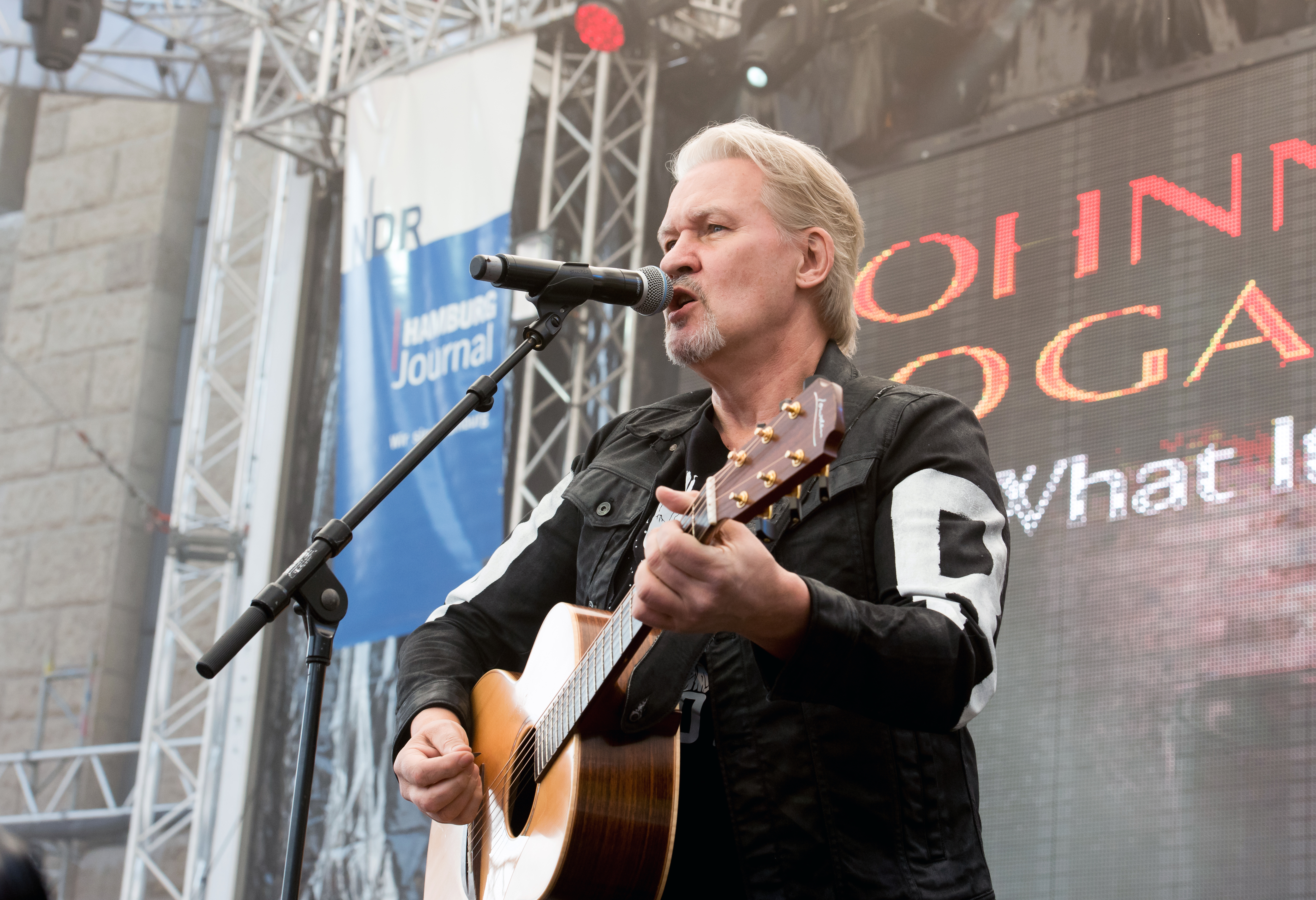 Johnny Logan beim Hafengeburtstag 2017